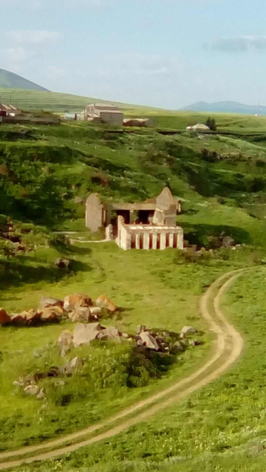 Վարսեր